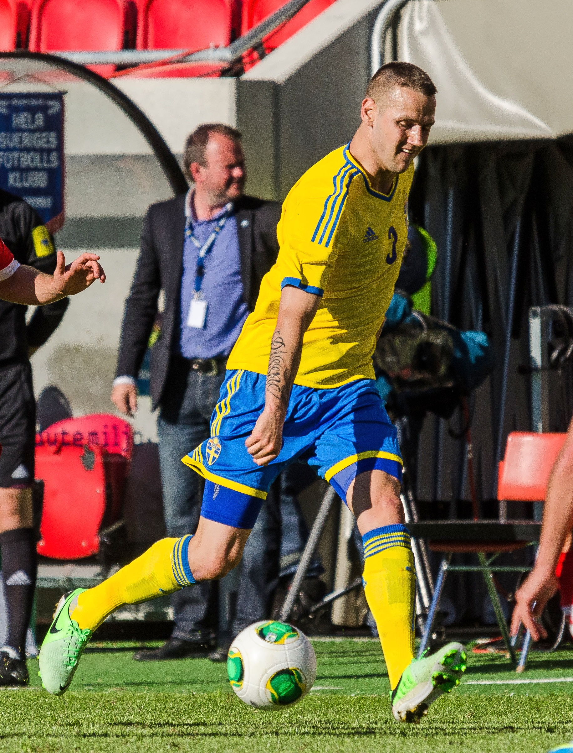 Mittbacken Alexander Milosevic i det svenska U21-landslagets 3-2 seger mot Schweiz i en träninglandskamp på Myresjöhus Arena i Växjö, 6/6 2013.